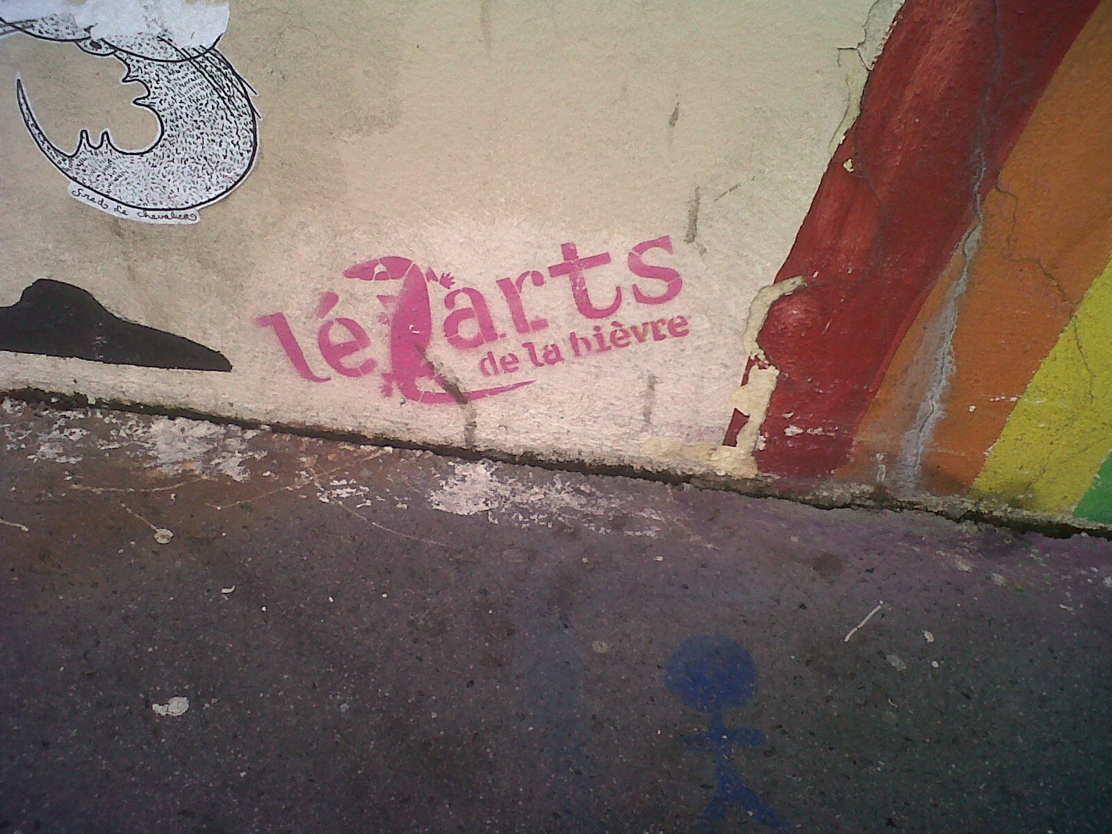 Rue du Père Teilhard de Chardin, dans le cinquième arrondissement de Paris